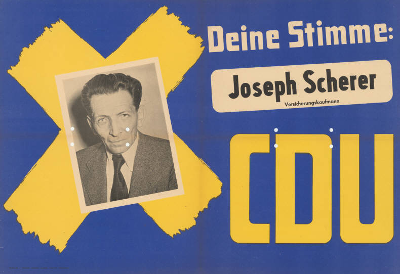 Deine Stimme: Joseph Scherer Versicherungskaufmann CDU Abbildung: Porträtfoto - Stimmkreuz Plakatart: Kandidaten-/Personenplakat mit Porträt Drucker_Druckart_Druckort: Bilddruck u. Klischee Lambert Lensing G.m.b.H., Dortmund Objekt-Signatur: 10-009 : 190 Bestand: Landtagswahlplakate Nordrhein-Westfalen (10-009) GliederungBestand10-18: Landtagswahlplakate Nordrhein-Westfalen (10-009) » Landtagswahl am 18.6.1950 » CDU » mit Porträtfoto Lizenz: KAS/ACDP 10-009 : 190 CC-BY-SA 3.0 DE